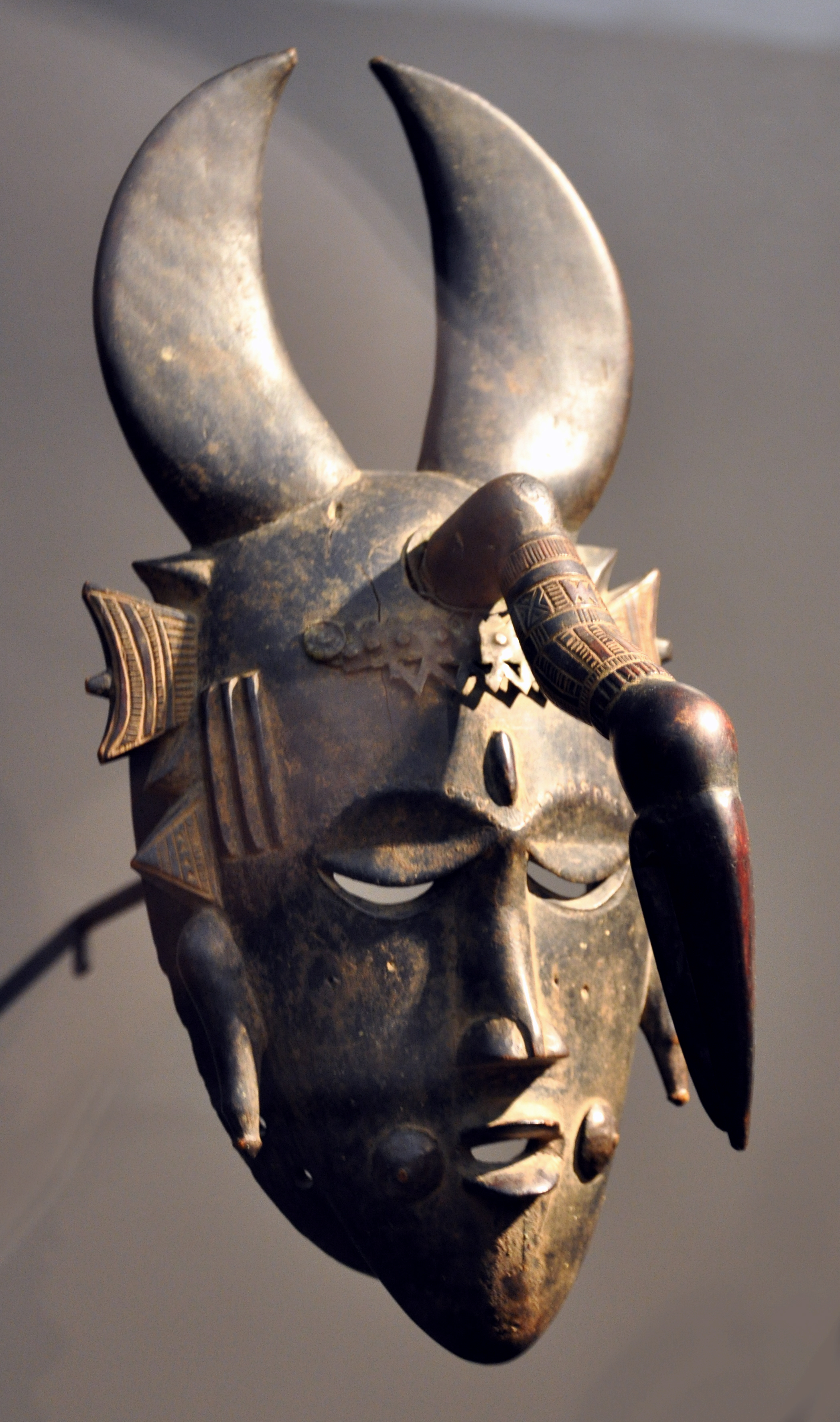 Maske mit Schnabel, Côte d'Ivoire, Werkstatt der Djimini-Region, 19./frühes 20. Jahrhundert; Holz, Messingblech Museum Rietberg, Zürich; Geschenk Rietberg-Gesellschaft; Inv. Nr. RAF 470